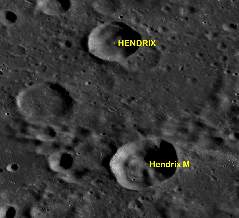 Cráter lunar Hendrix. Cráteres satélite. (Imagen LRO)